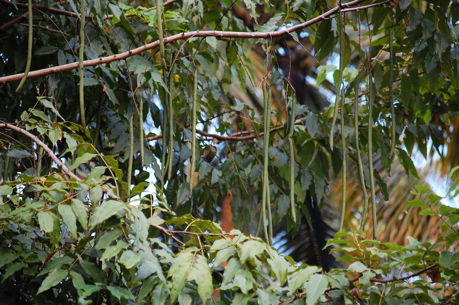 കണിക്കൊന്ന-കായ്കൾ